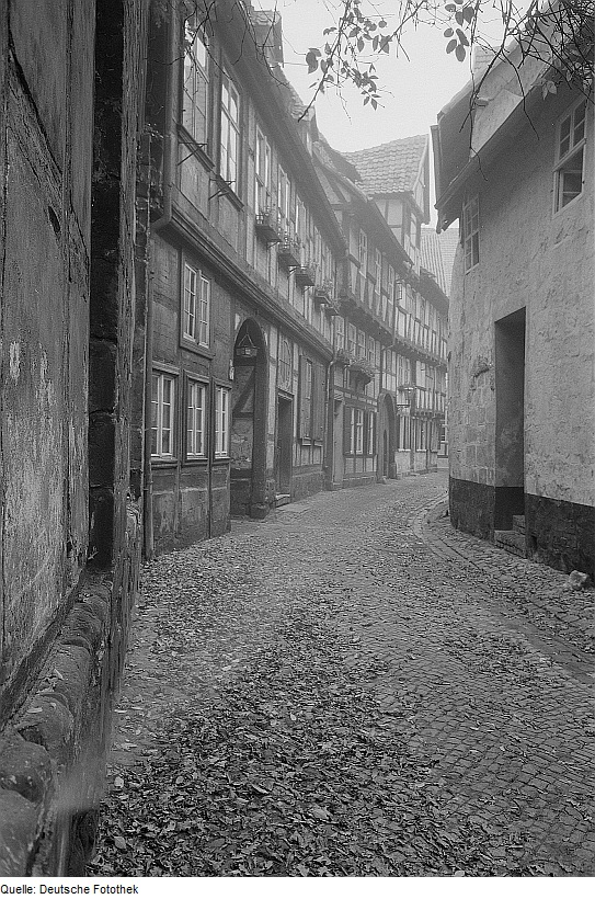 Original image description from the Deutsche Fotothek Quedlinburg. Blick durch eine Fachwerkstraße